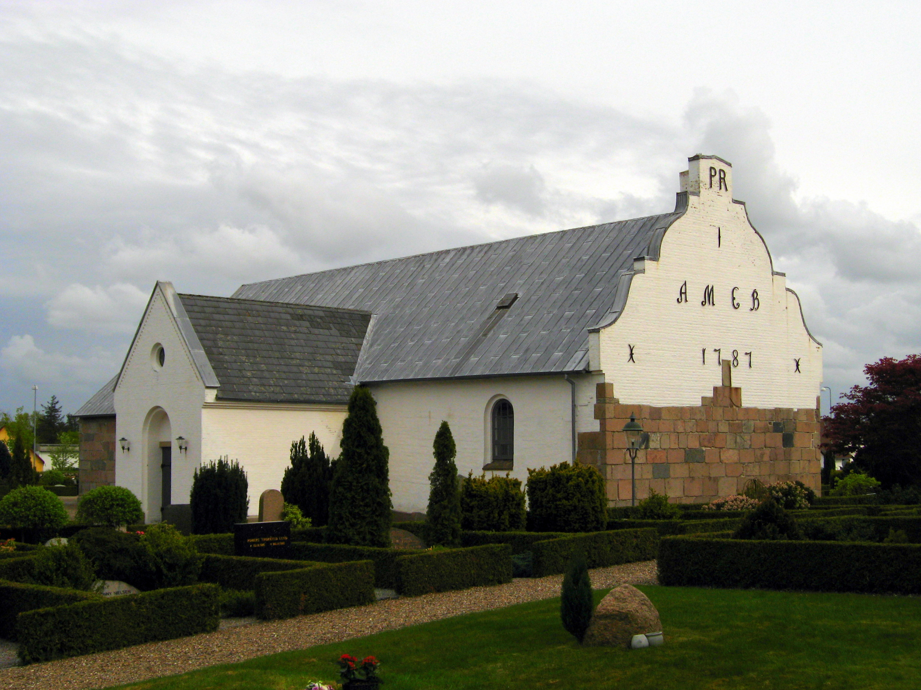 Tversted Kirke, Hjørring Kommune